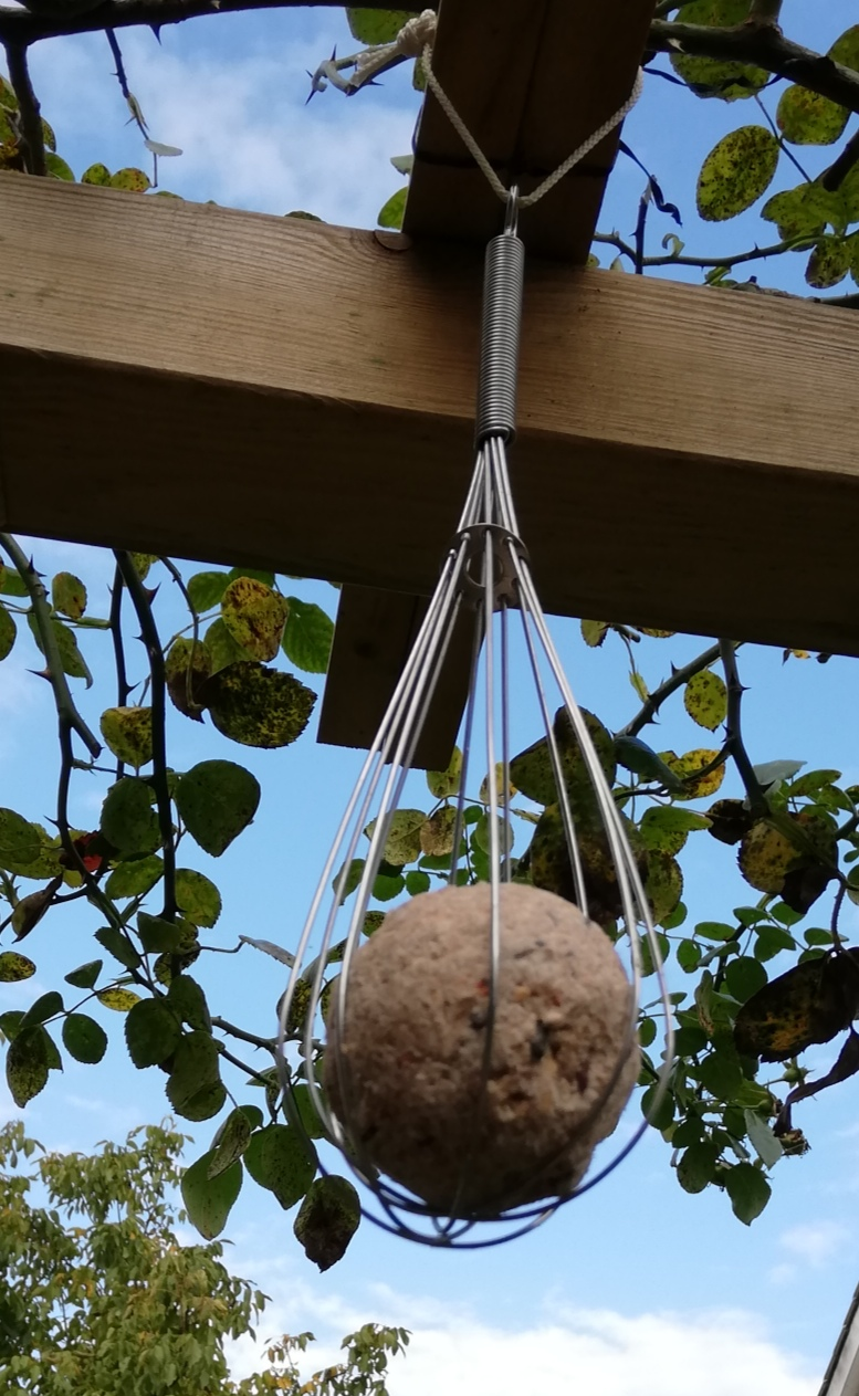 Mezenbol zonder plastic net in garde, gefotografeerd in particuliere tuin in Tiel